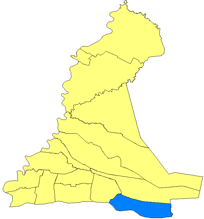 Mapa de Cerrito, Paraguay.